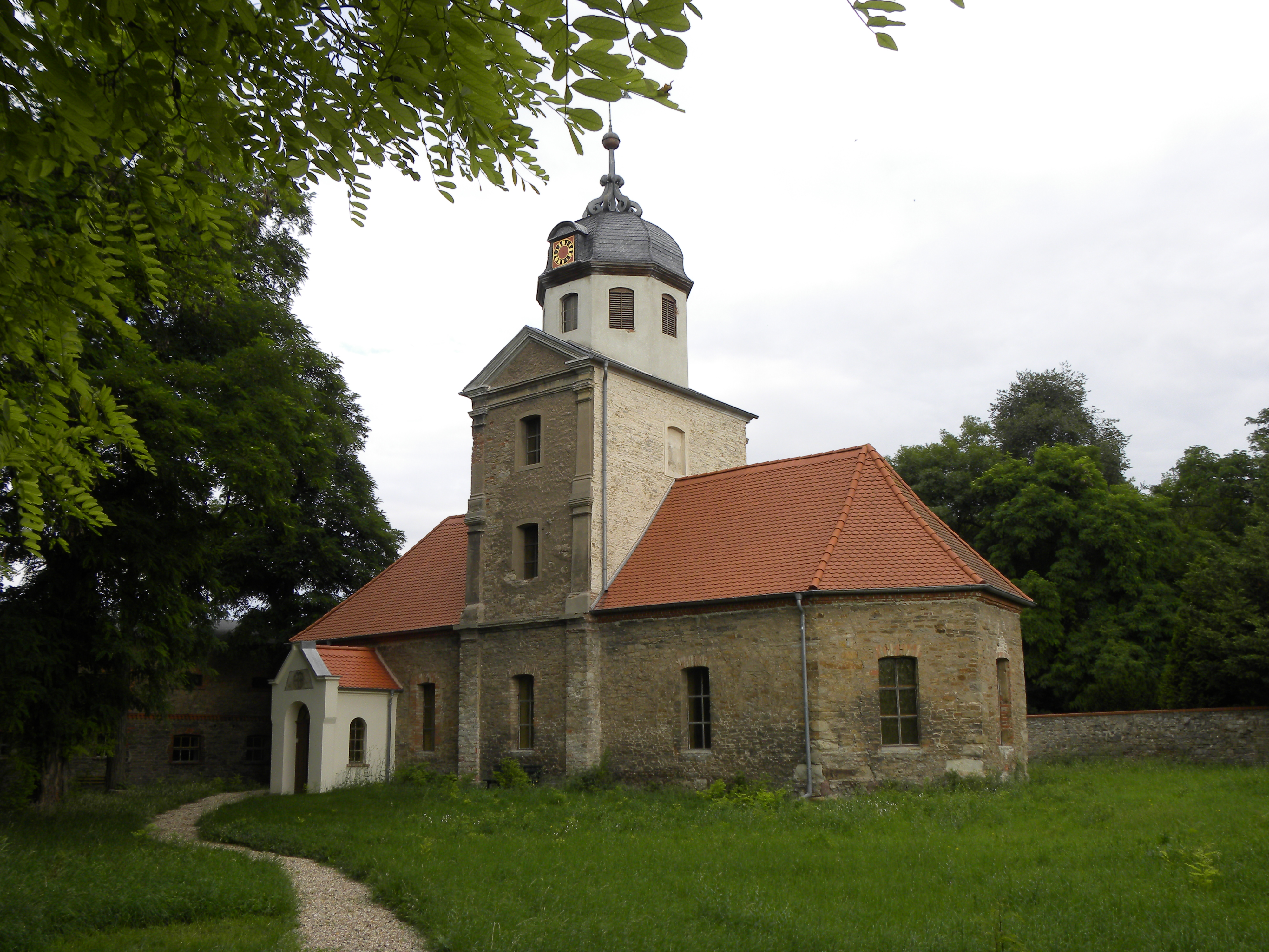 Die im 16. Jahrhundert erbaute Meditationskirche in Wohlsdorf gehört zum Lutherweg Sachsen-Anhalt